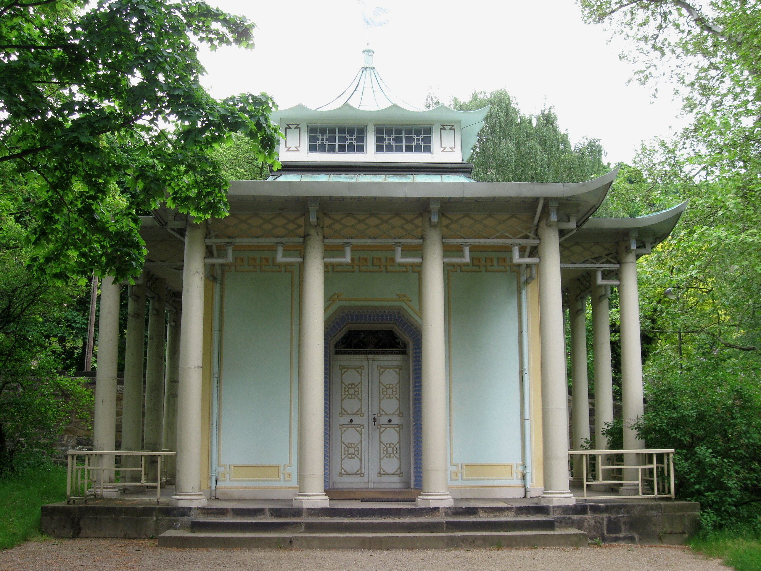 Chinesischer Pavillon im Schlosspark Pillnitz, Dresden